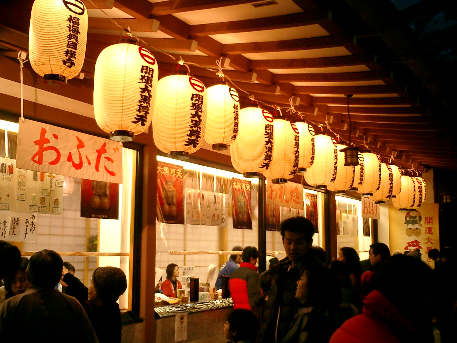 Ofuda(amulet)_counter